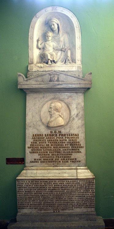 Polska